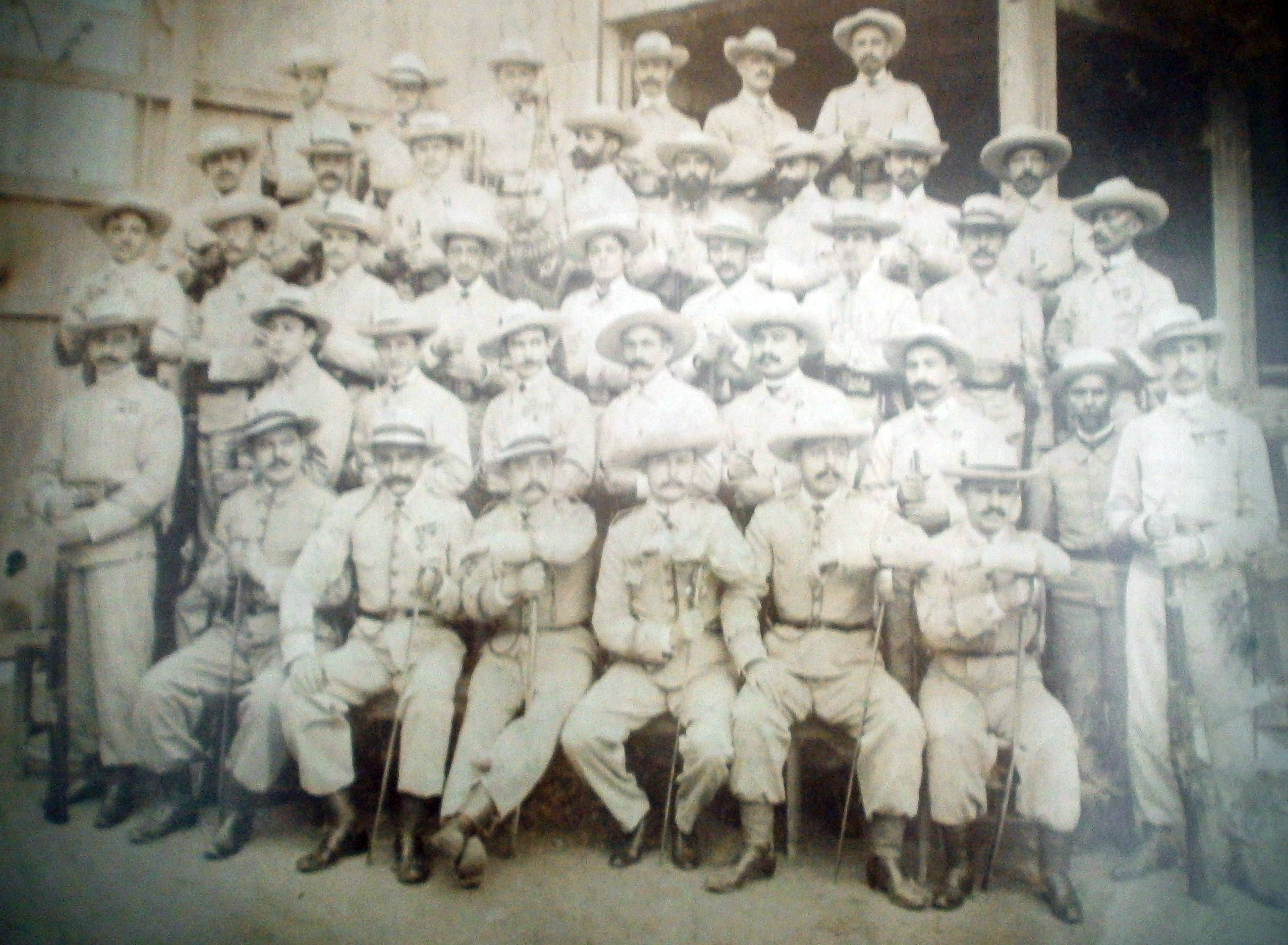 Mandos del Castilla 16. En 2ª línea, de pié el cuarto por la izquierda Bernardino Rovira padre del primer jefe del RIMZ Castilla n.º 16.